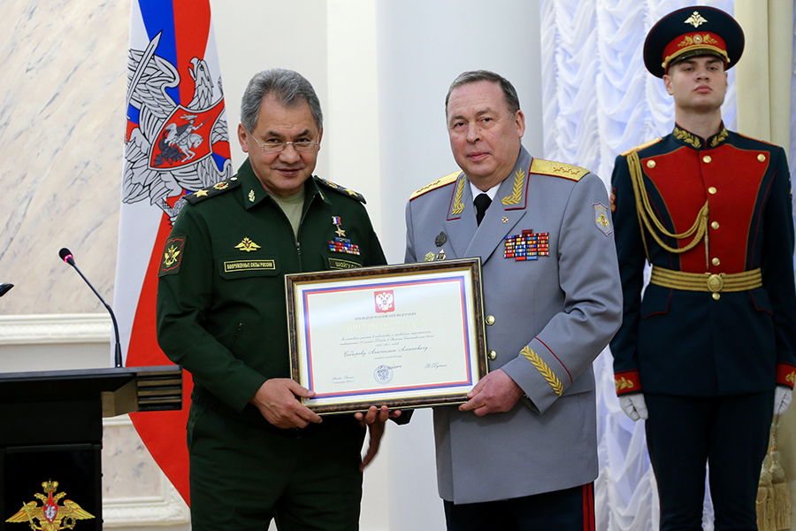 Министр обороны Российской Федерации генерал армии Сергей Шойгу вручает Почётную грамоту Президента России бывшему командующему войсками Западного военного округа генерал-полковнику Анатолию Сидорову